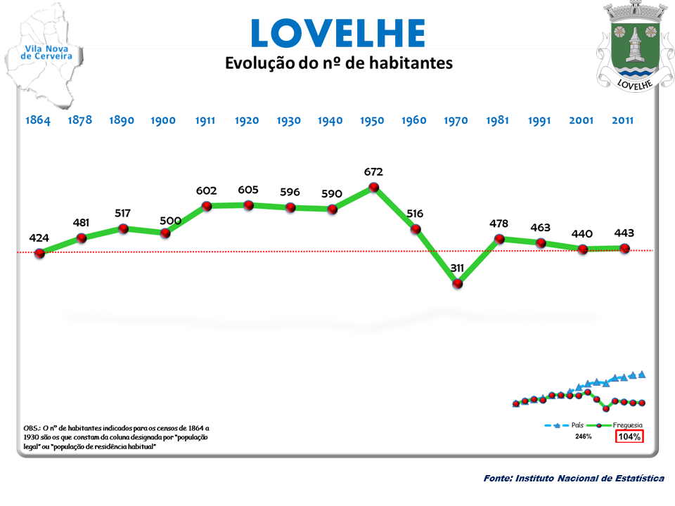 Censos 1864/2011